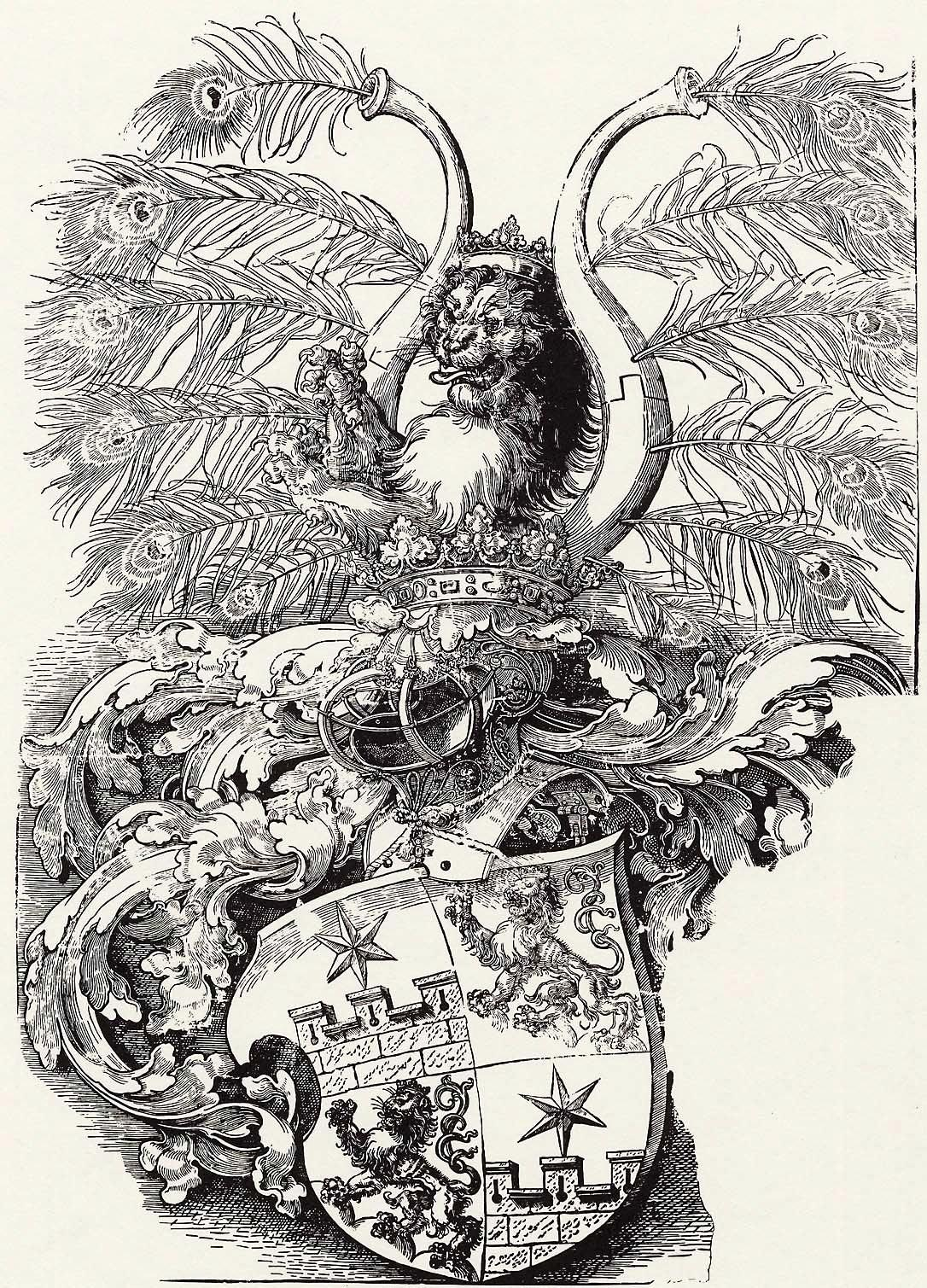 Wappen der von Rogendorff, nach einem um 1520 gefertigten großen Holzschnitt von Albrecht Dürer, für welchen der Meister sieben Ellen Samt als Rekompens erhielt. Das Größenverhältnis der einzelnen Teile des Wappens ist geändert: das Kleinod nimmt nahezu die Hälfte der ganzen Höhe ein. Die Form der Helmdecke charakterisiert alle Dürerschen Wappenzeichnungen. Die Auffassung der Tiere ist naturalistisch. (Meyers Konversations-Lexikon, 1888; ebd.: Entwickelung der Wappenkunst, Doppelseitige Farbkarte). Colin Eisler, Dürers Arche Noah. Tiere und Fabelwesen im Werk von Albrecht Dürer. München 1996 (zuerst 1991): "Das herrliche Gefieder des Pfaus muß Dürers Aufmerksamkeit erregt haben. Dennoch weiß man von keiner bedeutenden Studie zu diesem Vogel, dessen kostbares Fleisch man ebenso preist wie seine wunderbaren Federn. Ein Pfau befindet sich unter dem Glücksrad auf dem Holzschnitt Der Fuchs und die Zeit drehen das Glücksrad. Da er sich hier offenbar fehl am Platz fühlt, entfaltet er indigniert sein Gefieder nicht. Auf Dürers Wappenholzschnitt von 1520 stecken zwölf Pfauenfedern in den Büffelhörnern, die der Krone der Roggendorfs entwachsen. Das Werk entstand in Antwerpen, wo man solche Federn importierte. Sie formen einen Strahlenfächer um den drohend aufgerichteten, gekrönten Roggendorflöwen herum. Indem Dürer ein solch bombastisches Wappen schuf, bot sich ihm, der sich zeitlebens gern herausputzte, die Möglichkeit, selbst zum Pfau zu werden, denn die reichen Brüder bezahlten ihn mit sieben Ellen kostbaren Seidensamts."